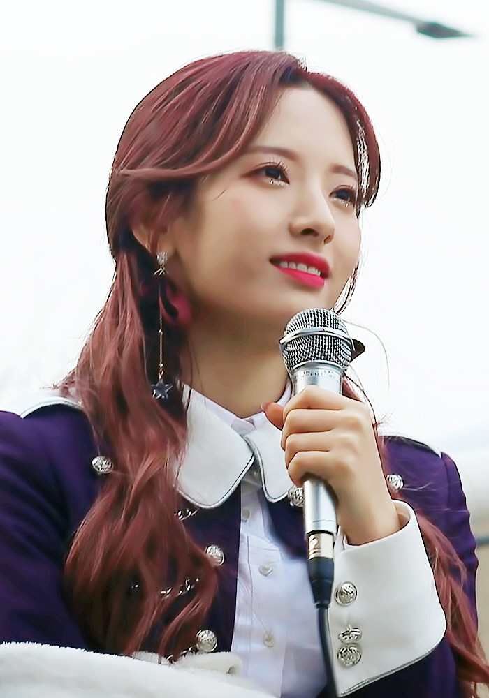 180317 우주소녀 미니팬미팅 직찍